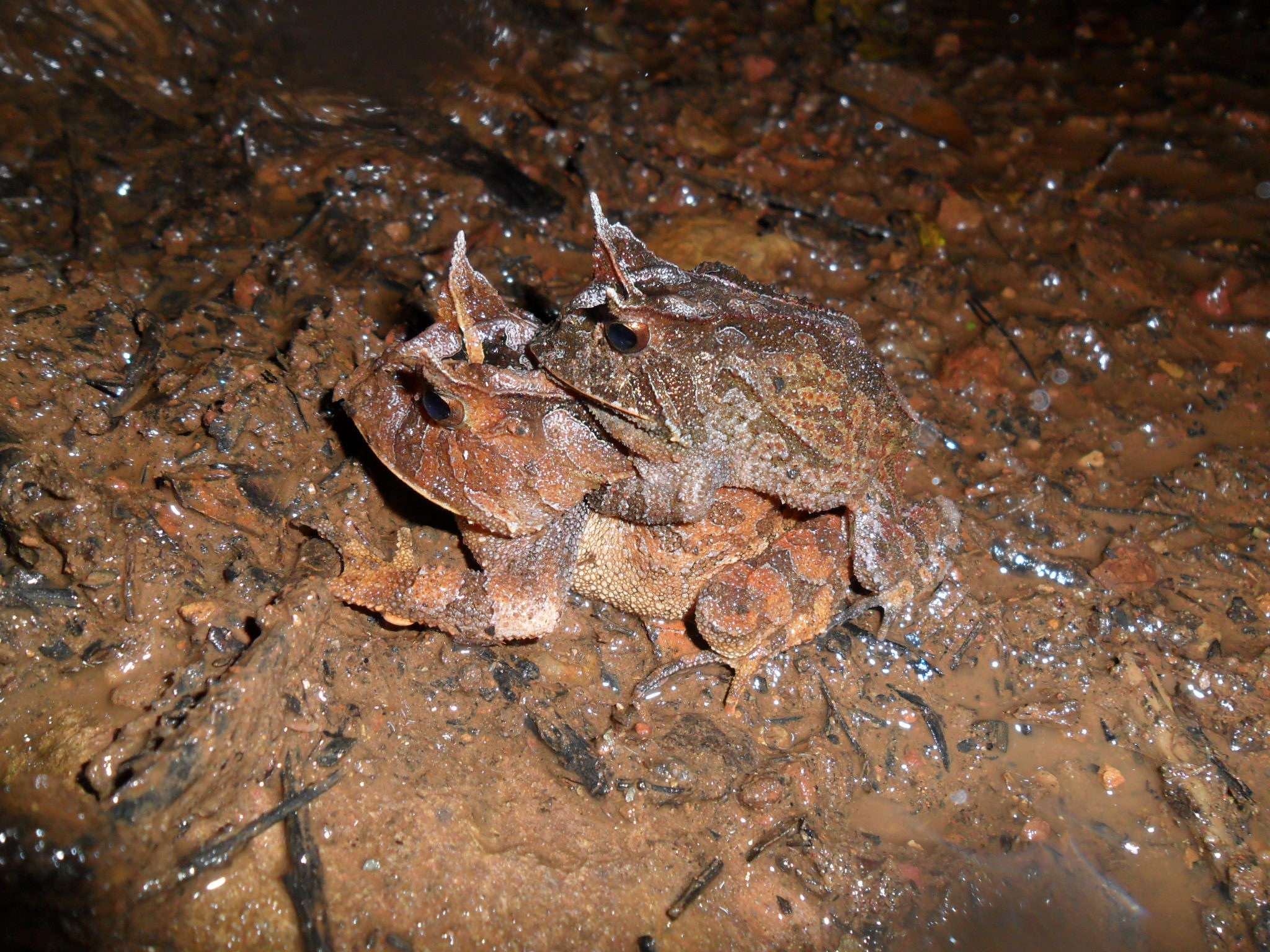 Amplexo, reprodução, anfíbios, anuros, sapo